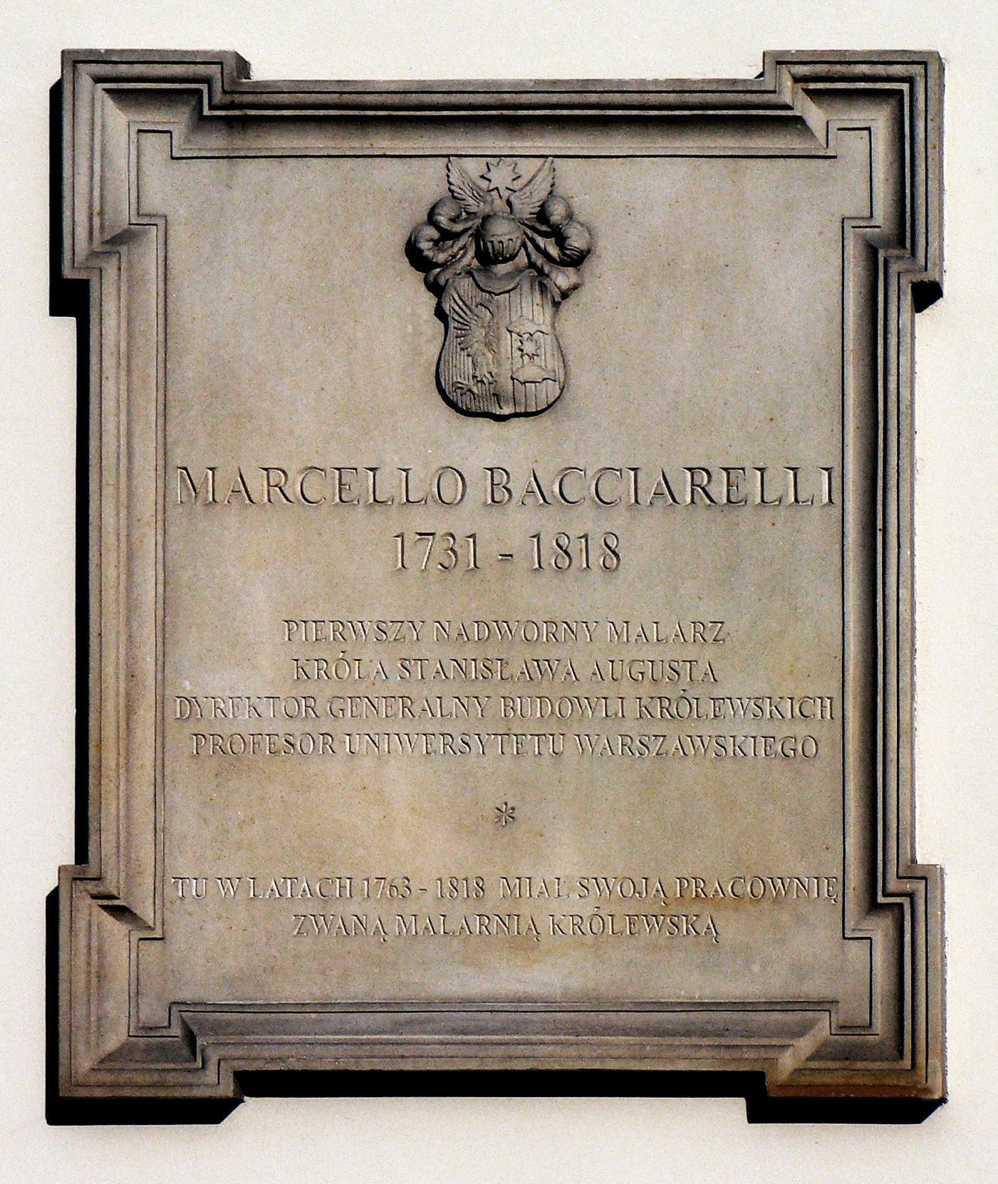 Tablica upamiętniająca Marcelo Bacciarelliego przy pl. Zamkowym w Warszawie